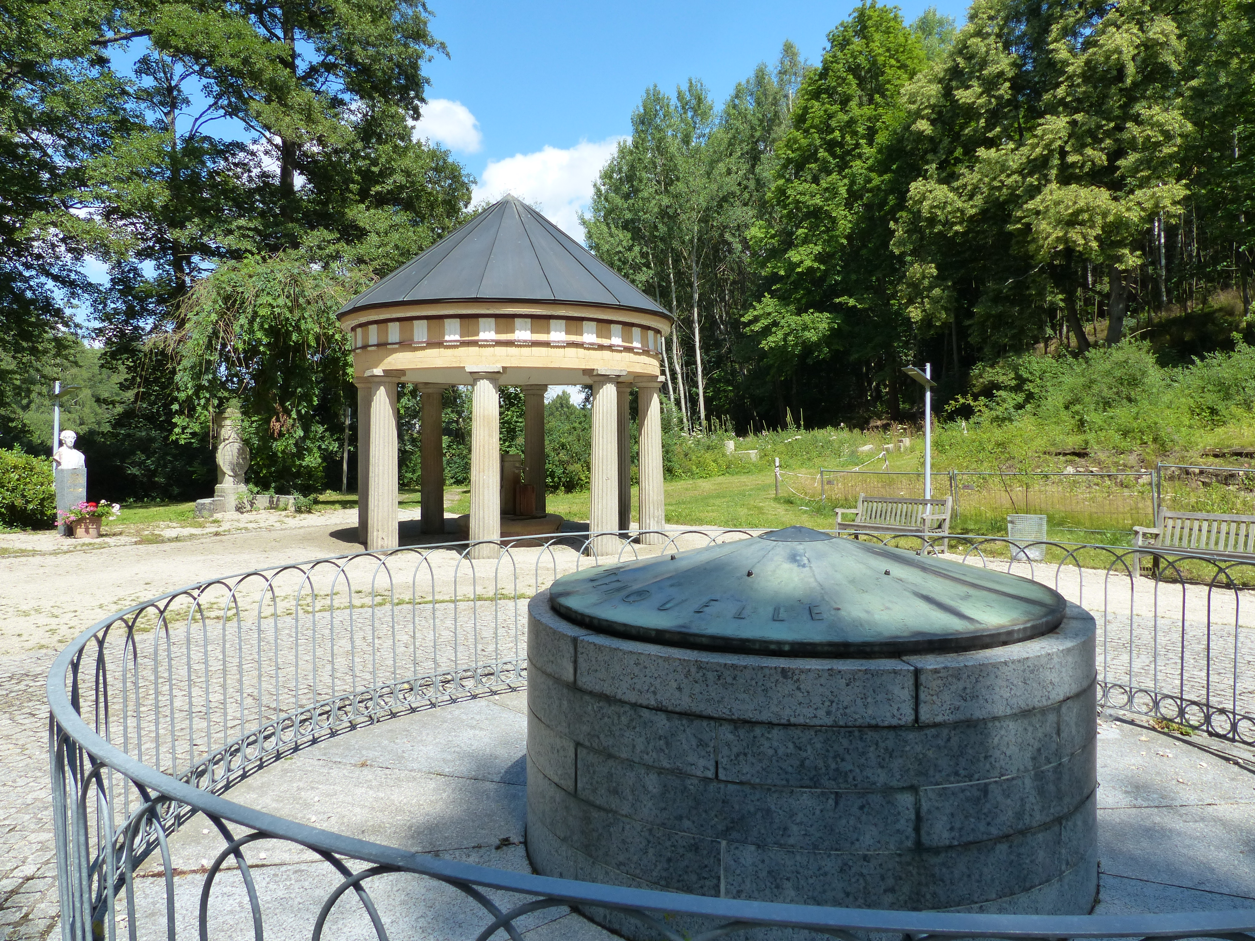 Ansicht von Bad Alexandersbad